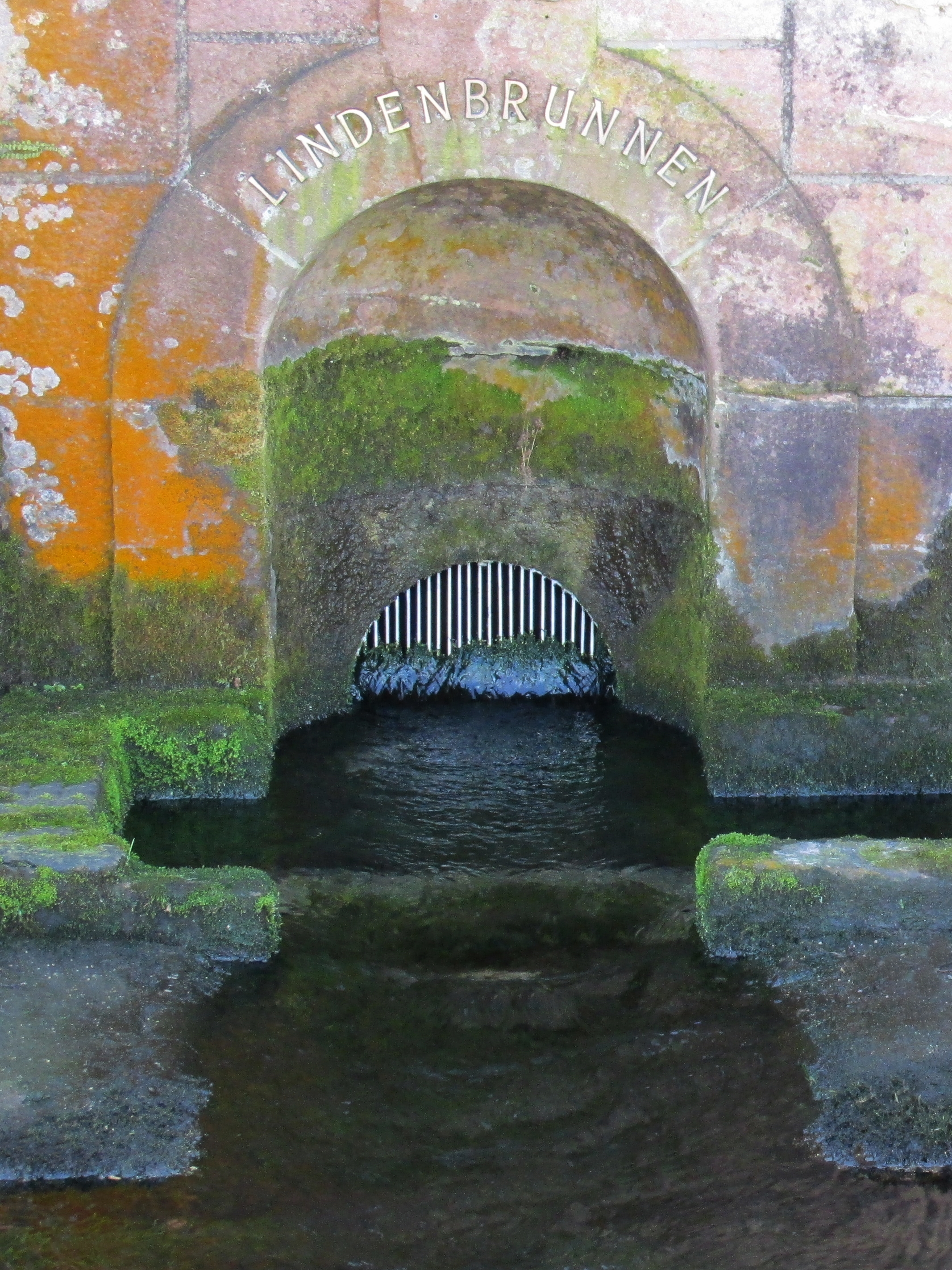 Lindenbrunnen - Moosbronn